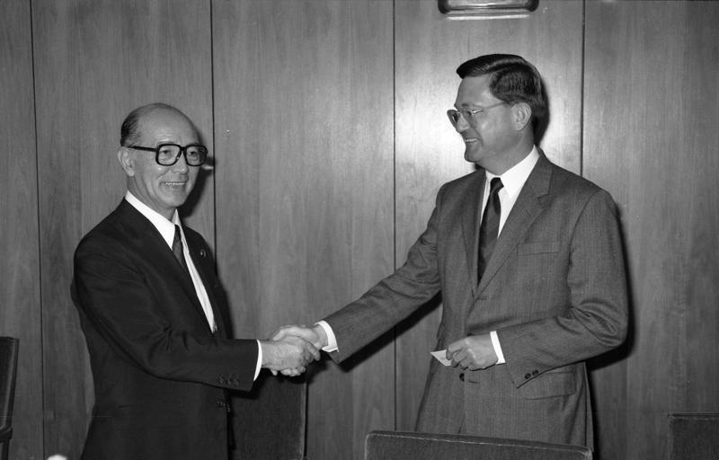 Bonn, 20. Juni 1988 Der Parlamentarische Staatssekretär beim Bundesminister des Innern, Carl-Dieter Spranger, empfing den japanischen Erziehungsminister Gentaro Nakajima, zu einem Meinungsaustausche über Fragen von beiderseitigem Interesse.